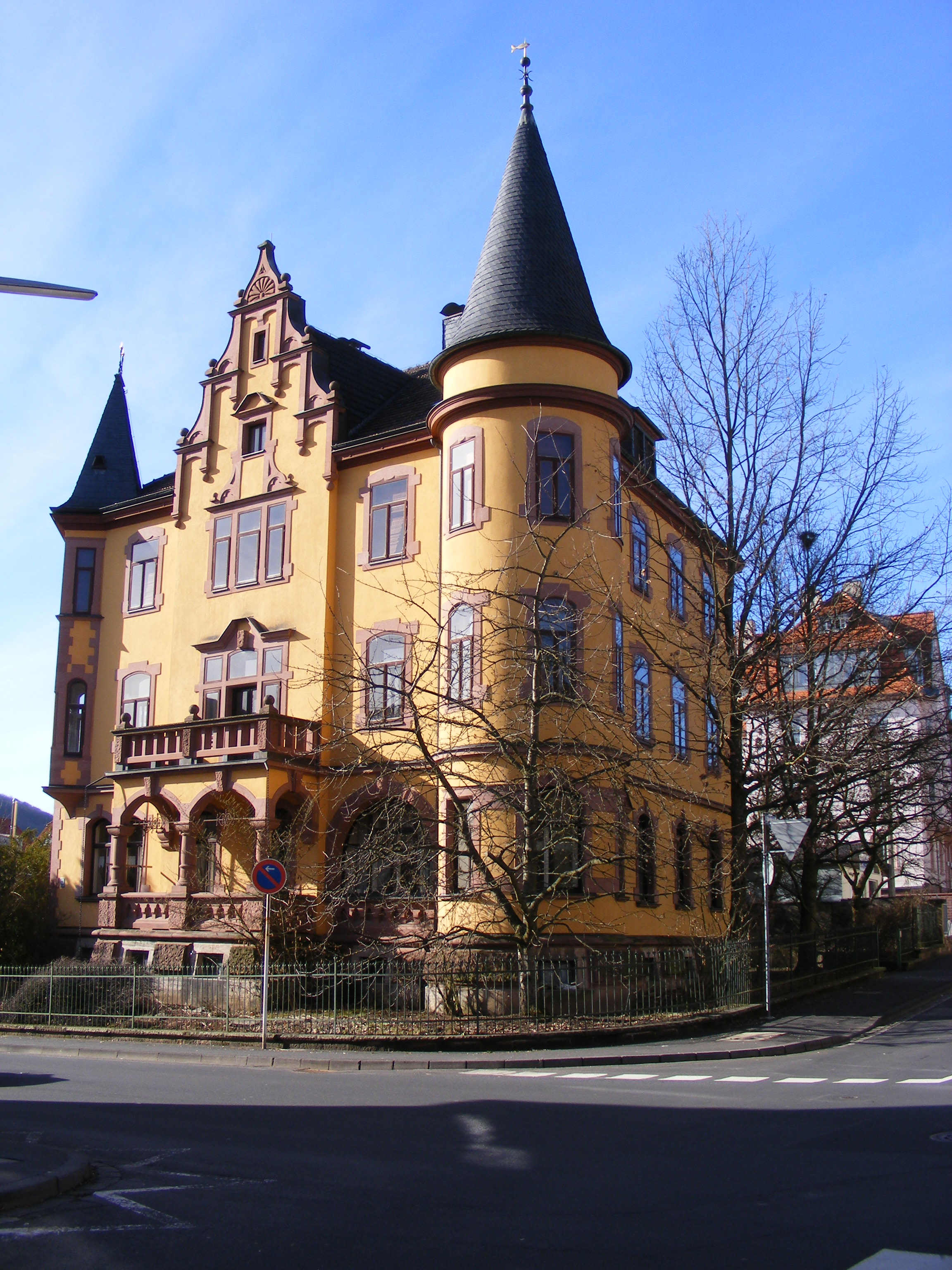 Bad Kissingen - Anwesen Erhardstr. 21.